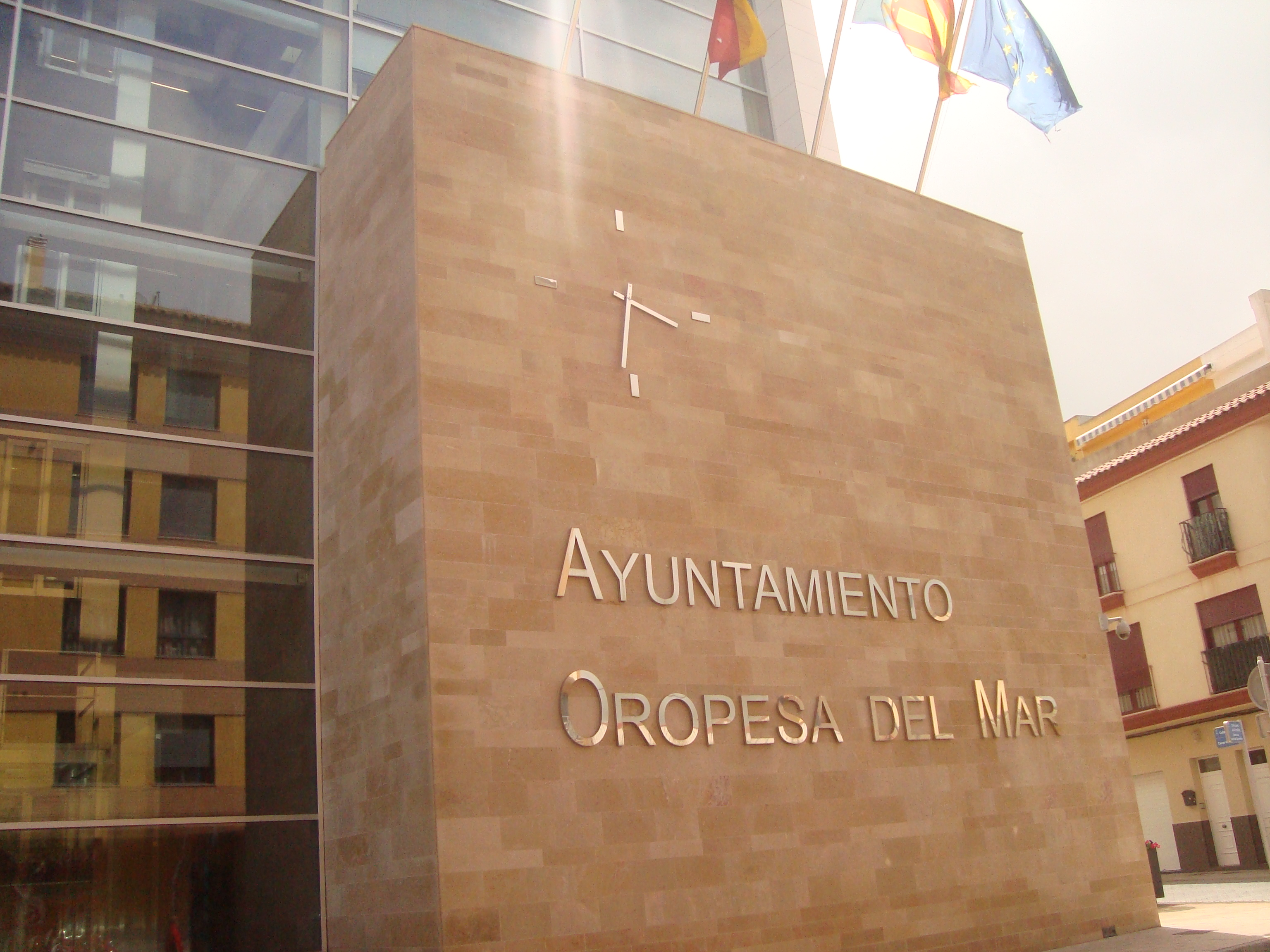 Ayuntamiento de Oropesa del Mar